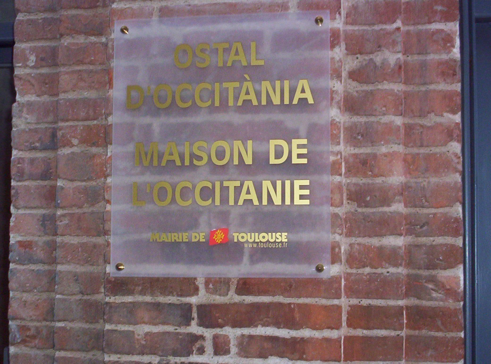 Fach per ieu Cedric31